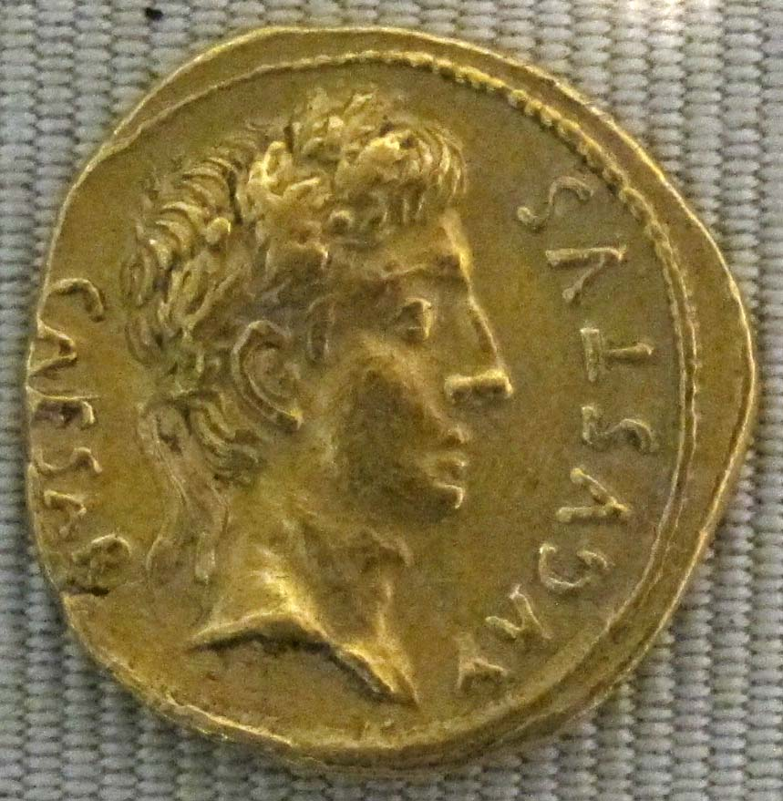 Impero, augusto, aureo, 19 ac.